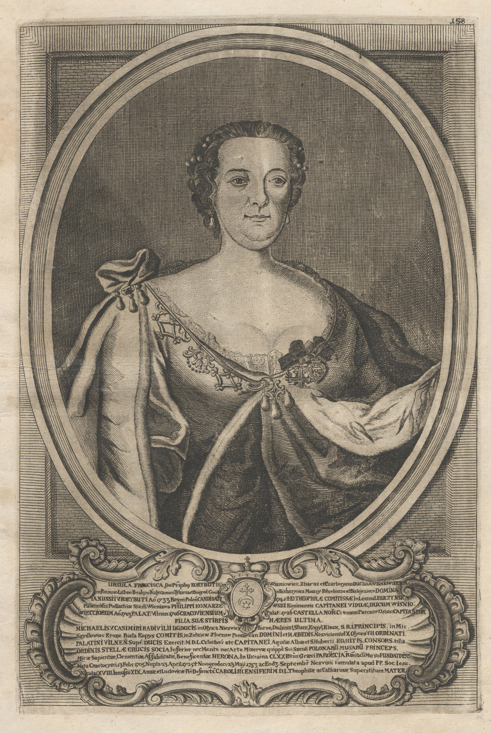 Беларуская (тарашкевіца): Партрэт Францішкі Ўршулі Радзівіл (Franciška Ŭršula Radzivił) з князёў Вішнявецкіх (Višniaviecki)